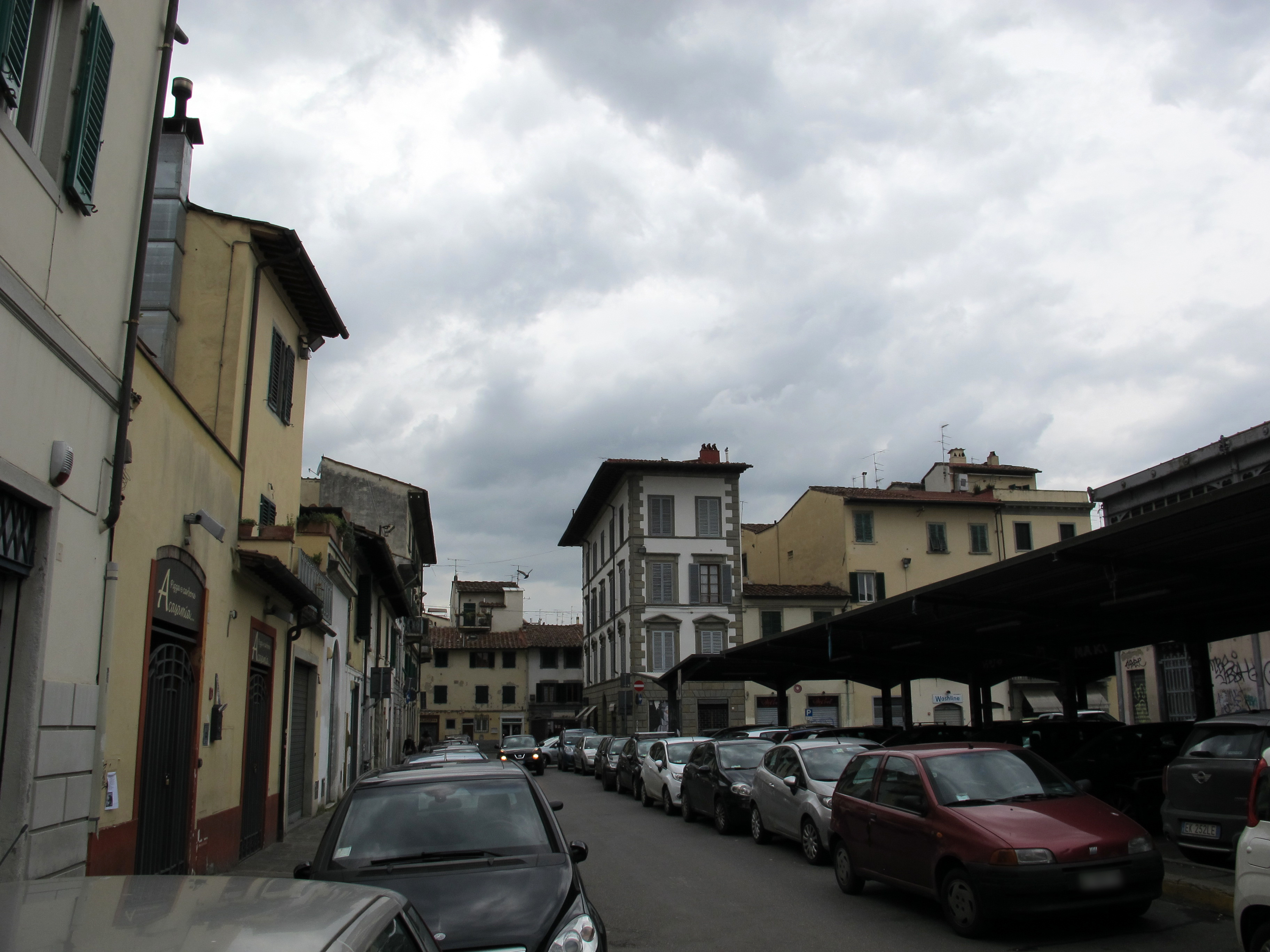 Piazza ghiberti, 03 verso via mino